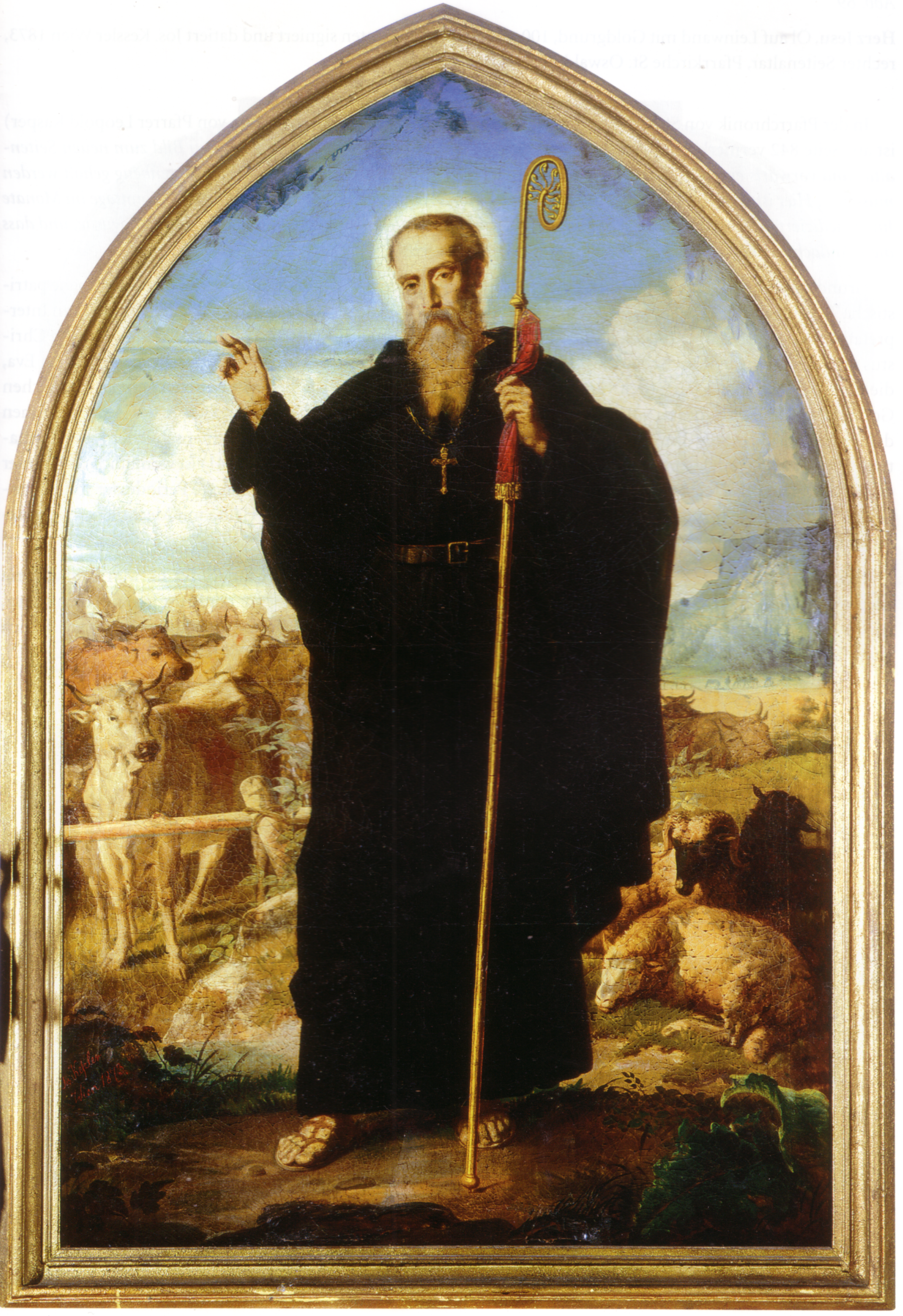 Altarbild